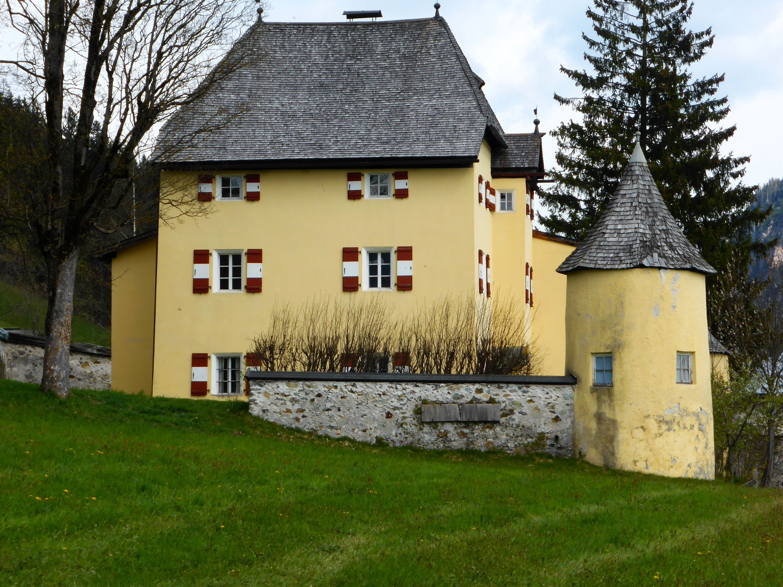 Anlage Schloss Mauer